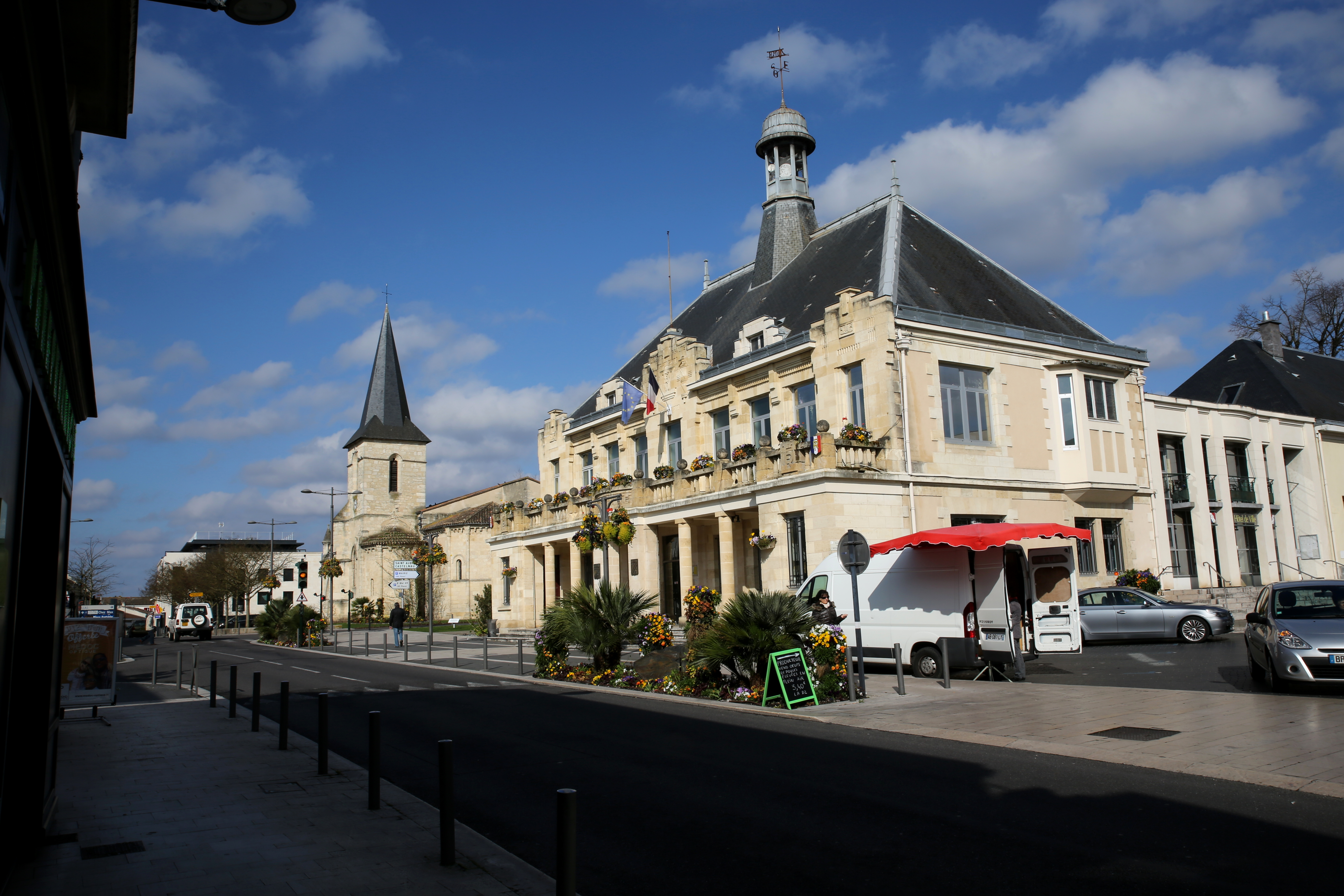 Mairie et église de Saint-Médard-en-Jalles.